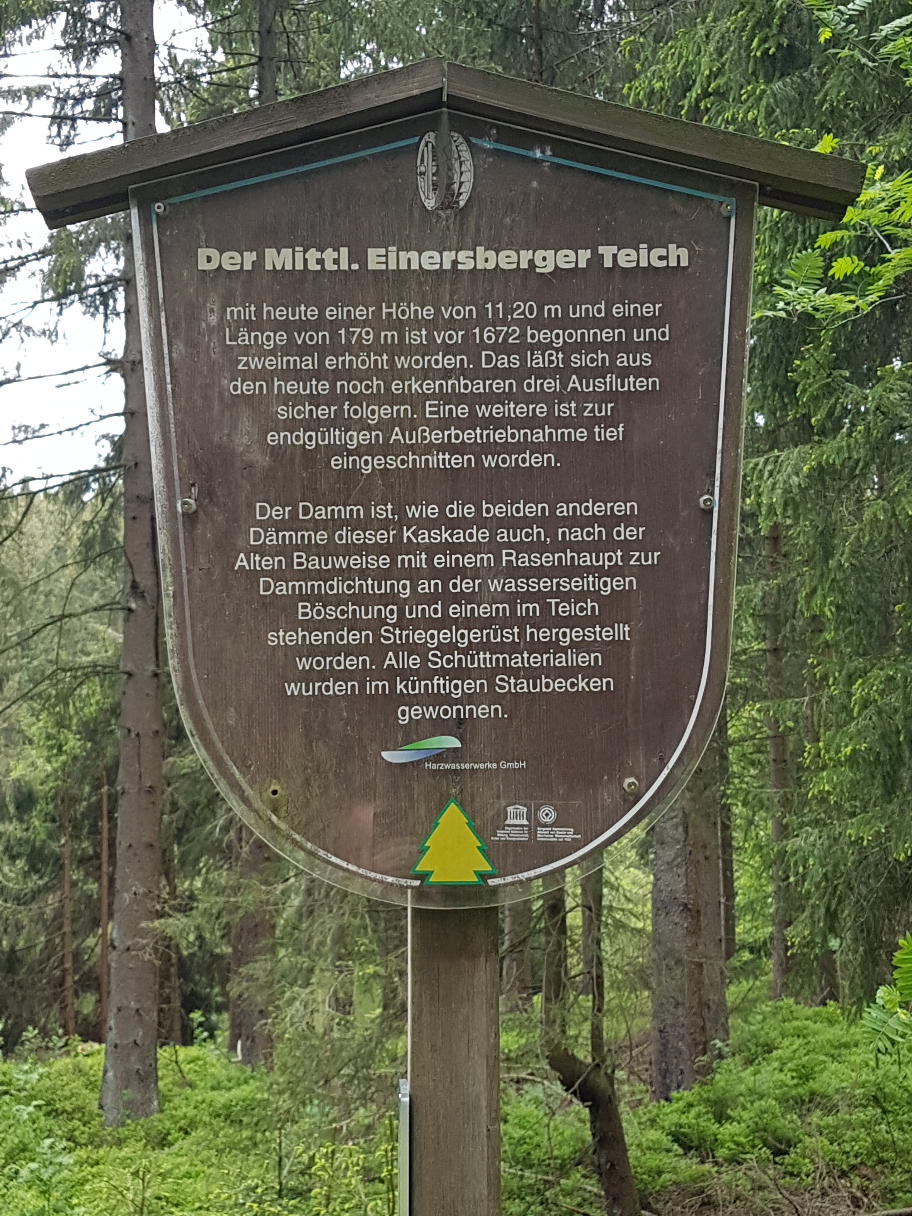 14.1-Infotafel Mittlerer Einersberger Teich, 26-05-2019